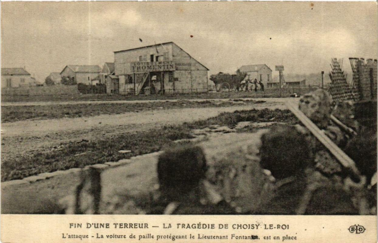 foto de jornal sobre o cerco ao anarquista Bonnot